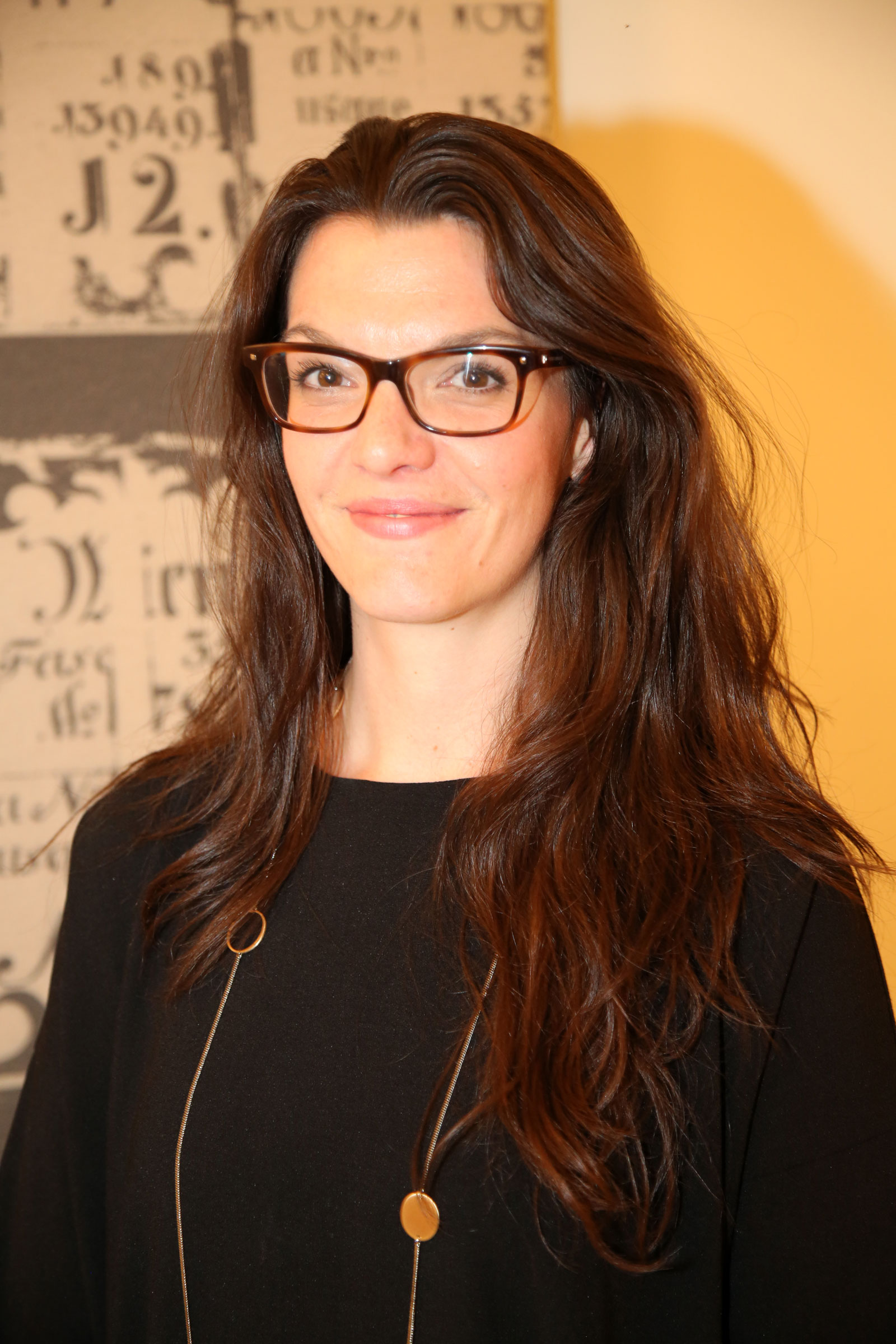 Blaha_Barbara-7240